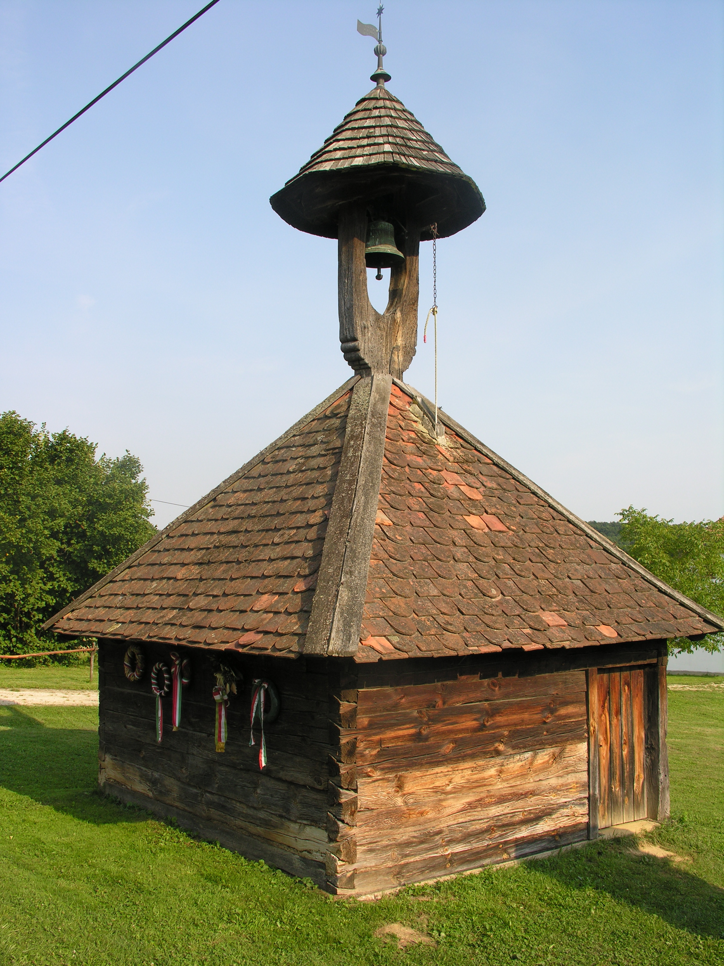 Szomoróc (Kercaszomor) református harangláb This is a photo of a monument in Hungary. Identifier: 8982